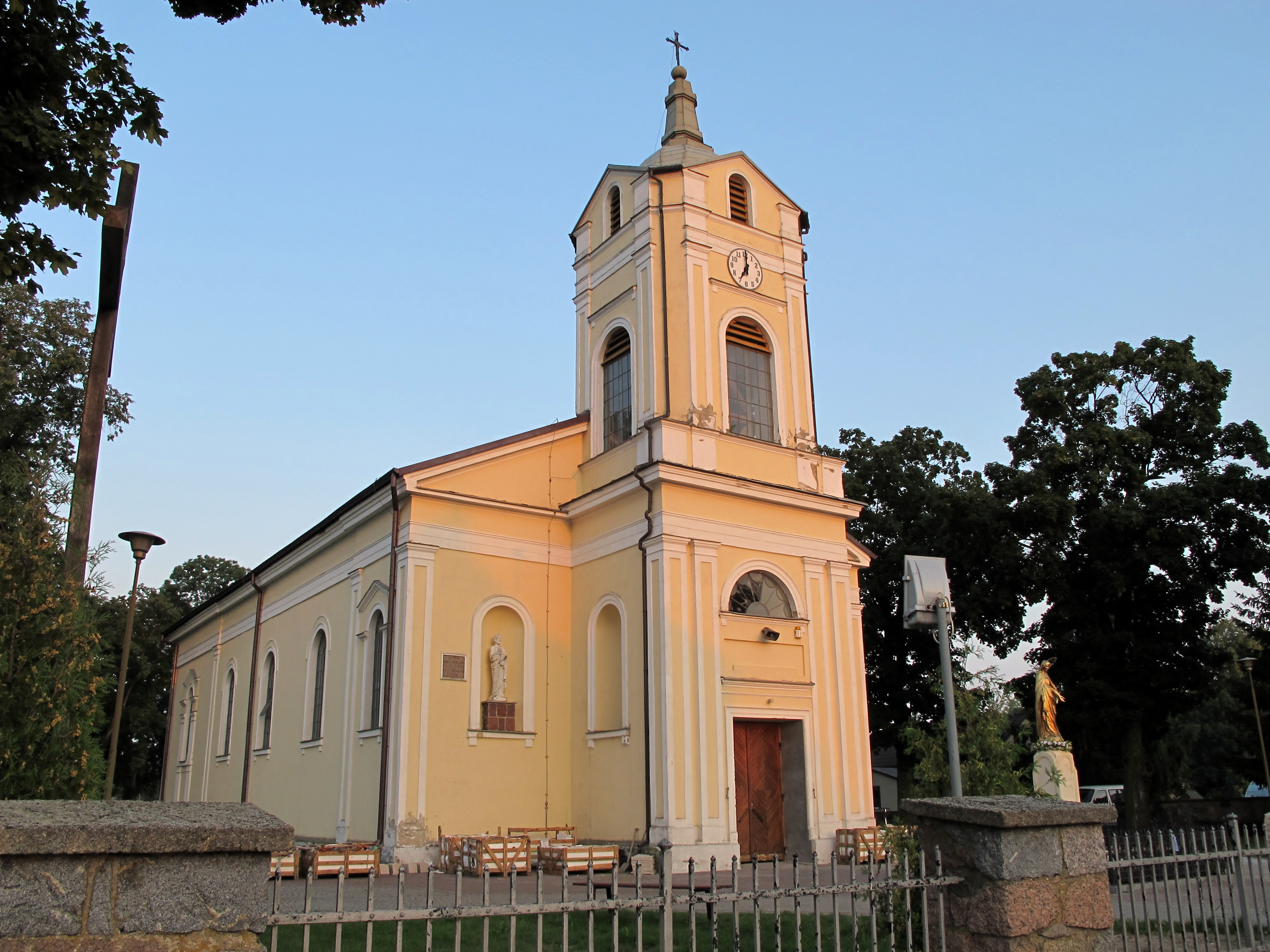 Kościół pw. św. Apostołów Piotra i Pawła przy ulicy Kolejowej 5 w Jabłoni Kościelnej, gmina Nowe Piekuty, podlaskie